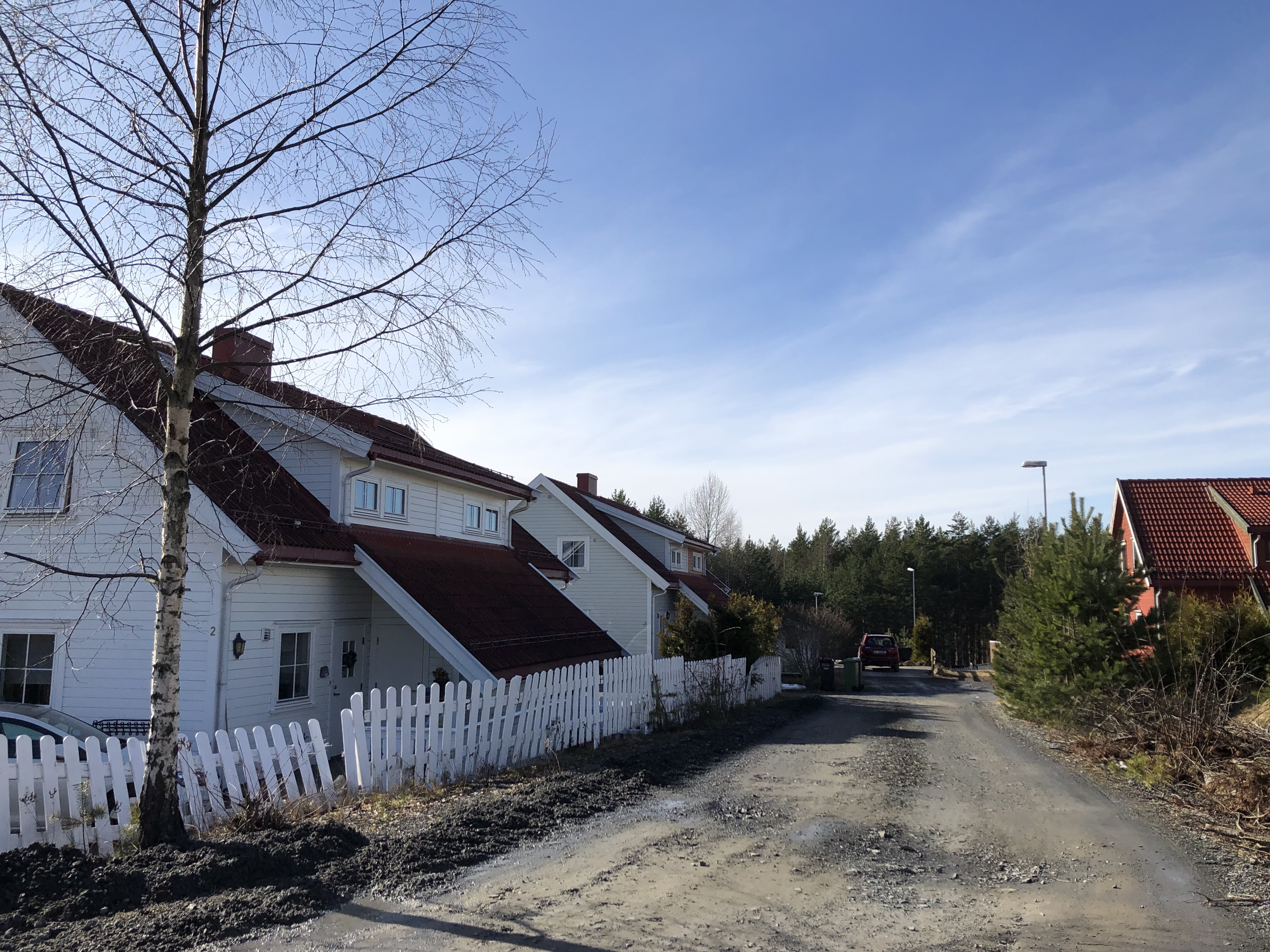 Skogstjerneveien, Jevnaker